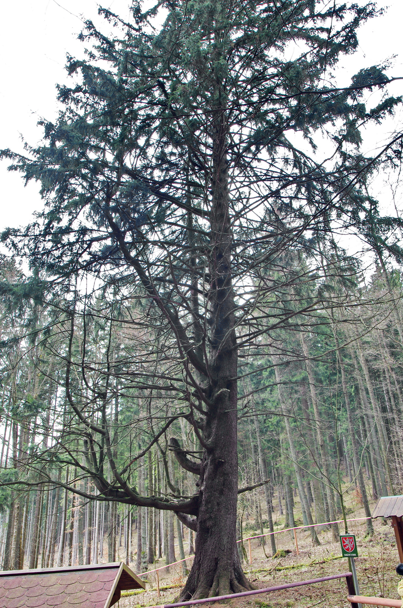 Památný strom - Král smrků - Mariánské Lázně, okres Cheb